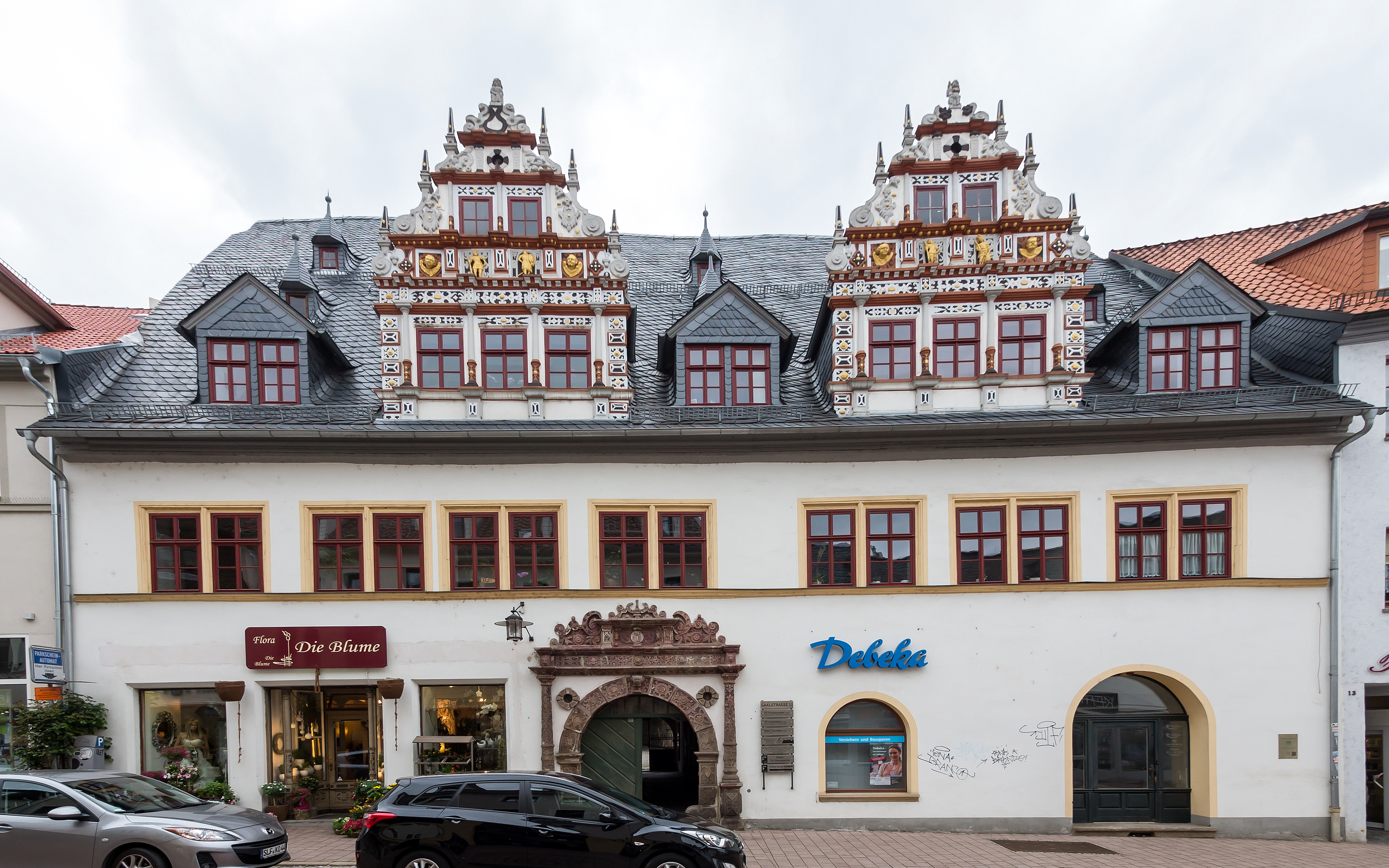 Saalfeld Saalstraße 11 Patrizierhaus IV